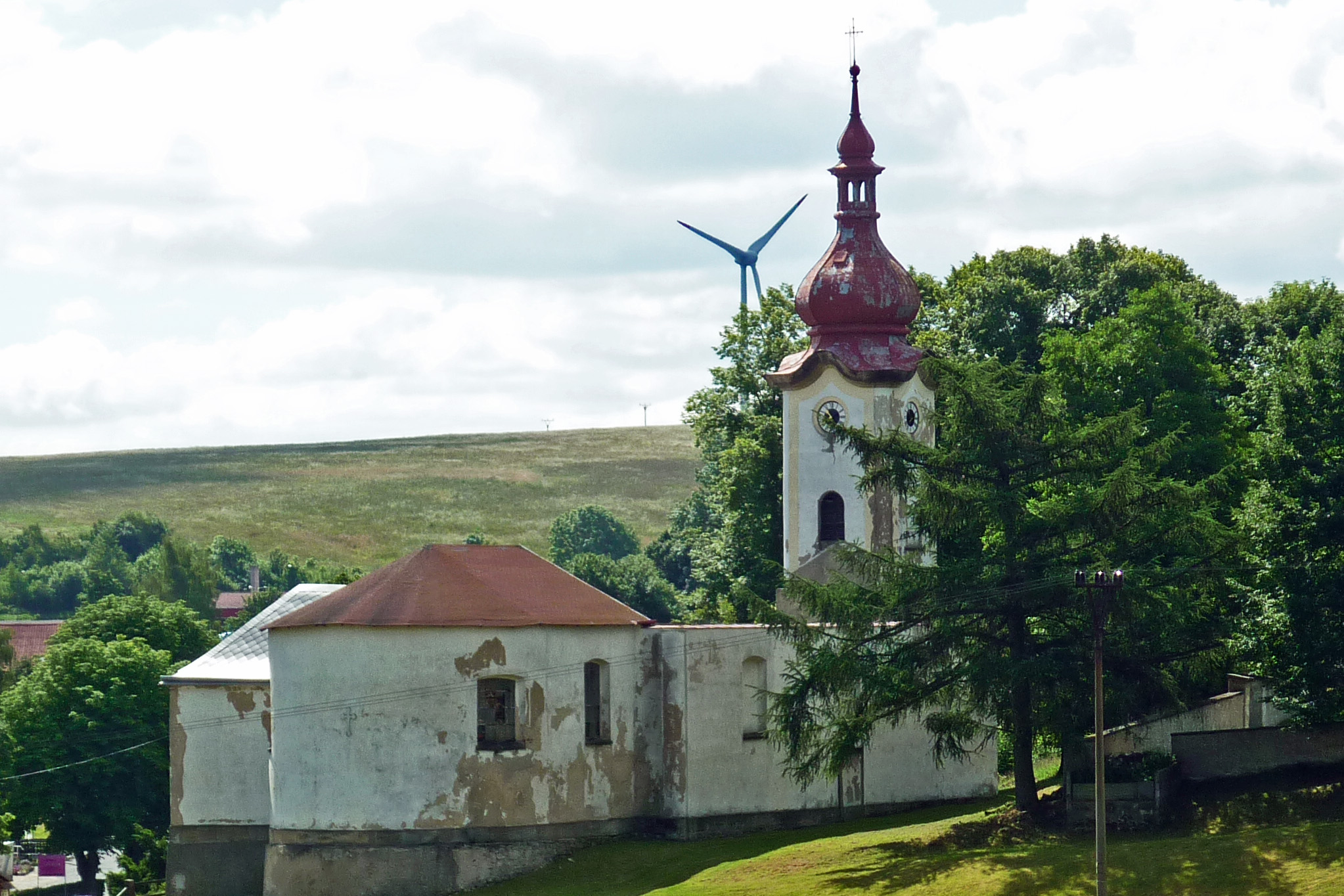 Nikolauskirche in Peterswald (Kostel sv. Mikuláše, Petrovice)